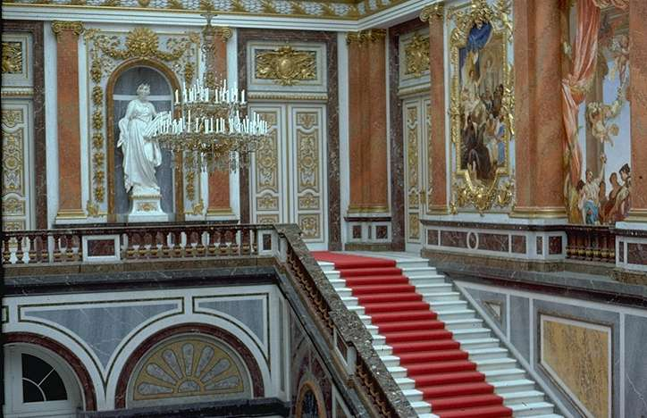 Schloss Herrenchiemsee, Gesandtentreppe